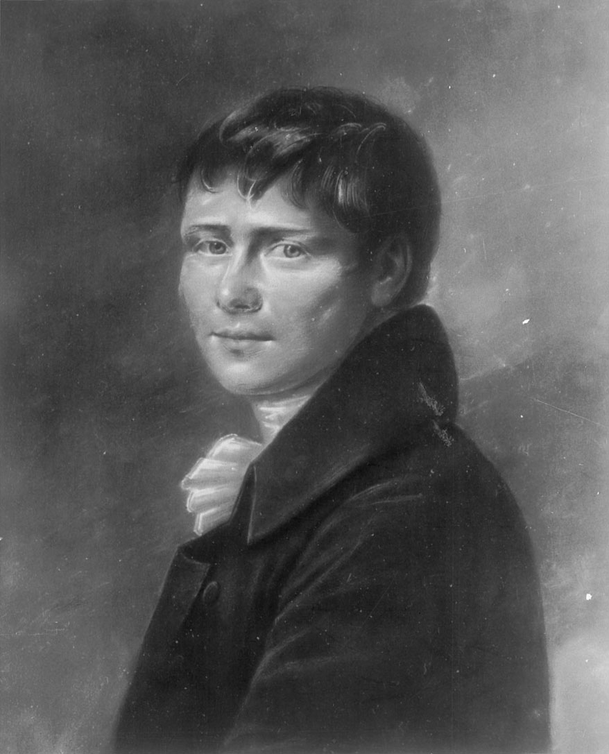 Bildnis Heinrich von Kleist, 1801, Zeichnung, Dresden, Sammlung Otto Krug